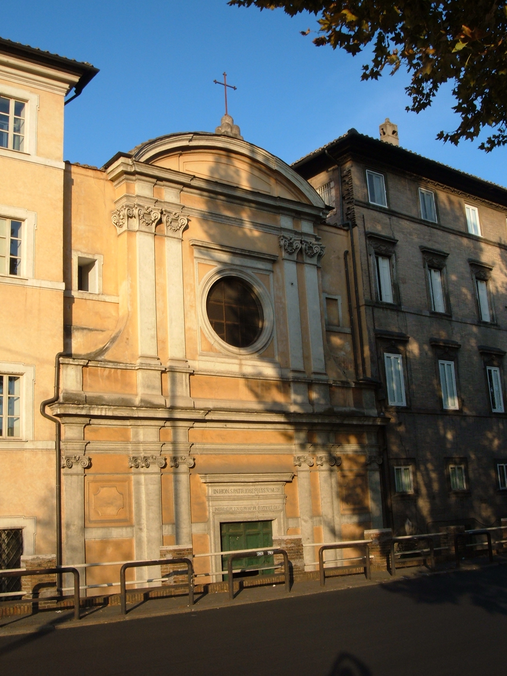 Chiesa di San Giuseppe alla Lungara, a Roma, nel rione Trastevere.